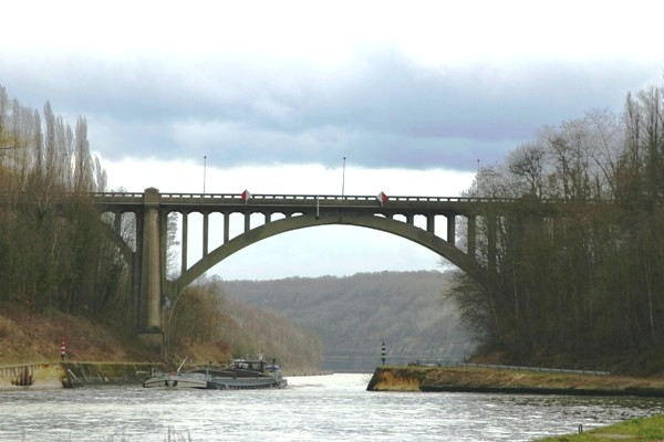 Déi al Bréck vu Vroenhoven am Mäerz 2006